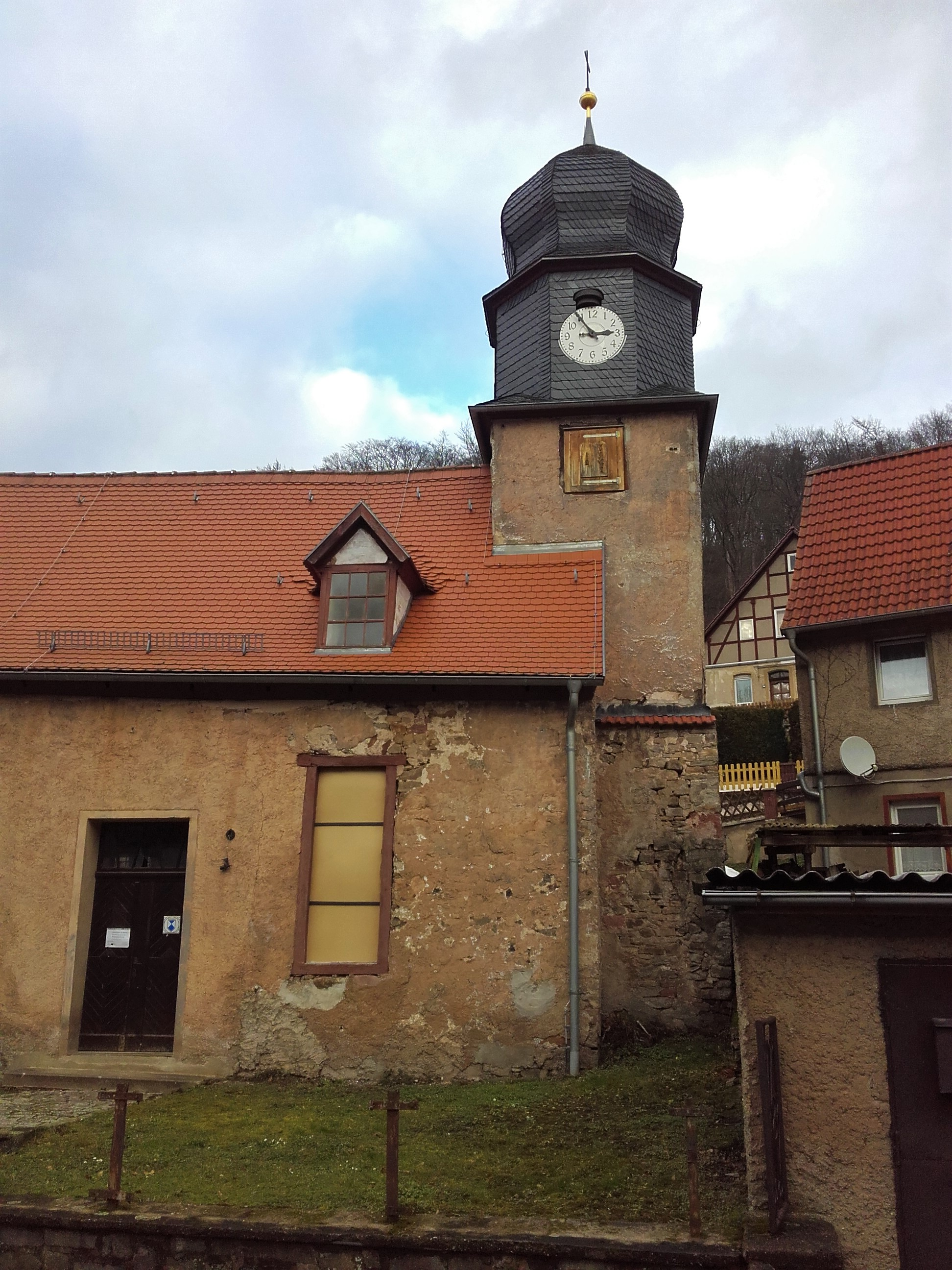 Die evangelische St.-Nicolai-Kirche in Morungen, Stadt Sangerhausen.